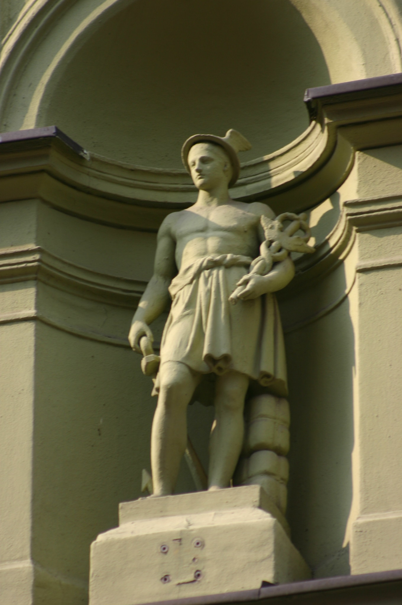 Hermes, rzeźba z fasady jednej z kamienic przy ul. Szerokiej w Toruniu.